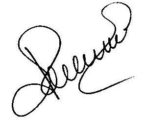 Автограф Валерия Кипелова